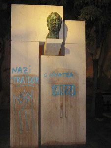 Pintades blaveres en la casa i el monument a Joan Fuster en Sueca en 2006 A finals d'agost de 2006 han aparegut pintades blaveres en el monument i la casa natal de l'escriptor i intel.lectual Joan Fuster al seu poble nadiu de Sueca (Ribera Baixa). En aquesta imatge veiem pintades en el monument que el seu pòble nadiu li dedicà.